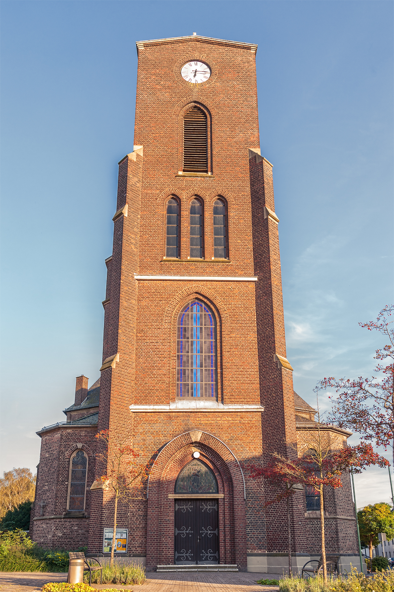 St. Michael (Echtz) – Die Kirche St. Michael ist ein Kirchengebäude im Dürener Stadtteil Echtz im Kreis Düren, Nordrhein-Westfalen. Die Kirche ist unter Nr. 8/1 in die Denkmalliste der Stadt Düren eingetragen.